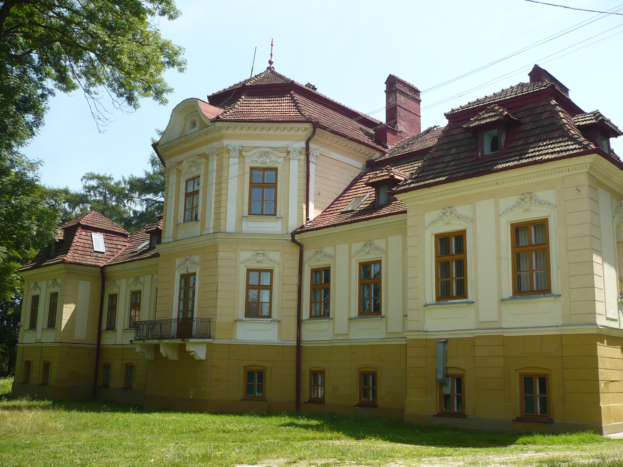 Pałac. Lubień Wielki